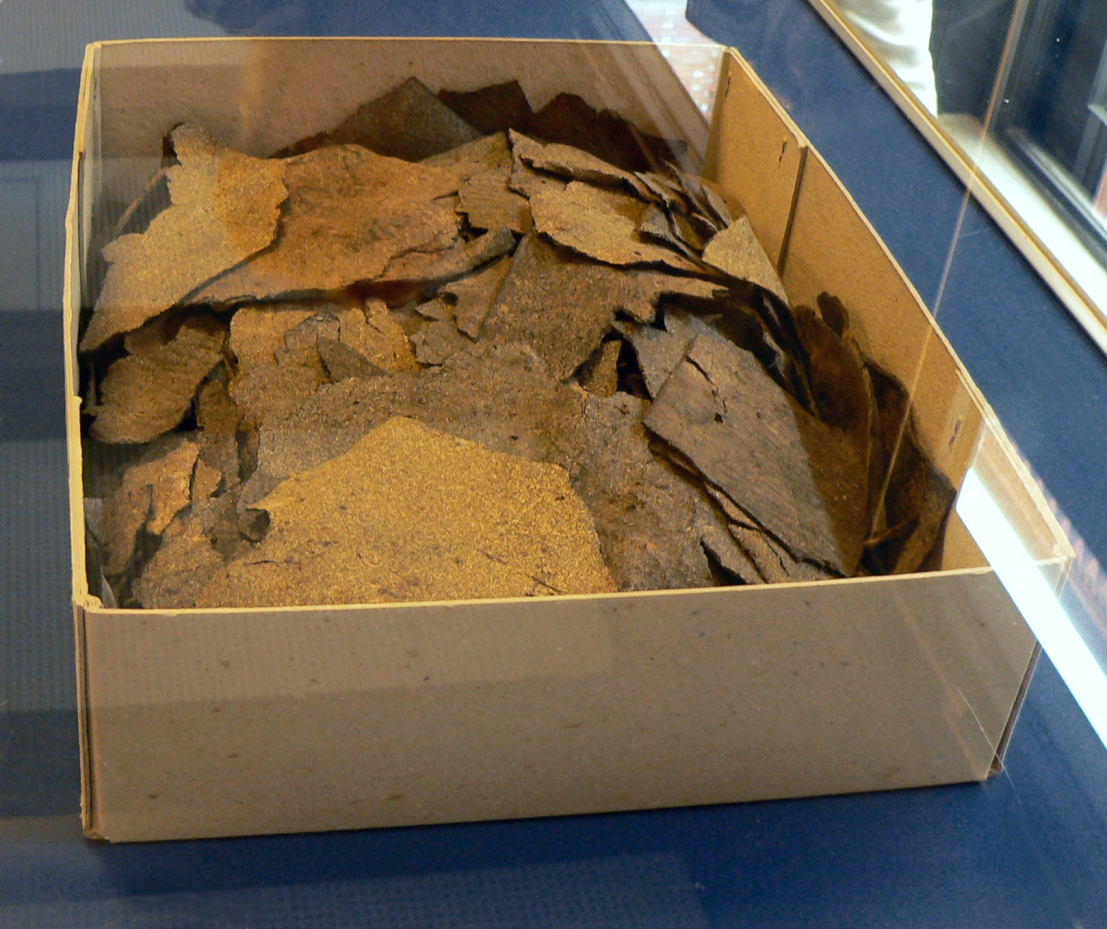 Gefundene Teerpappe beim Münzschatz von Lüneburg